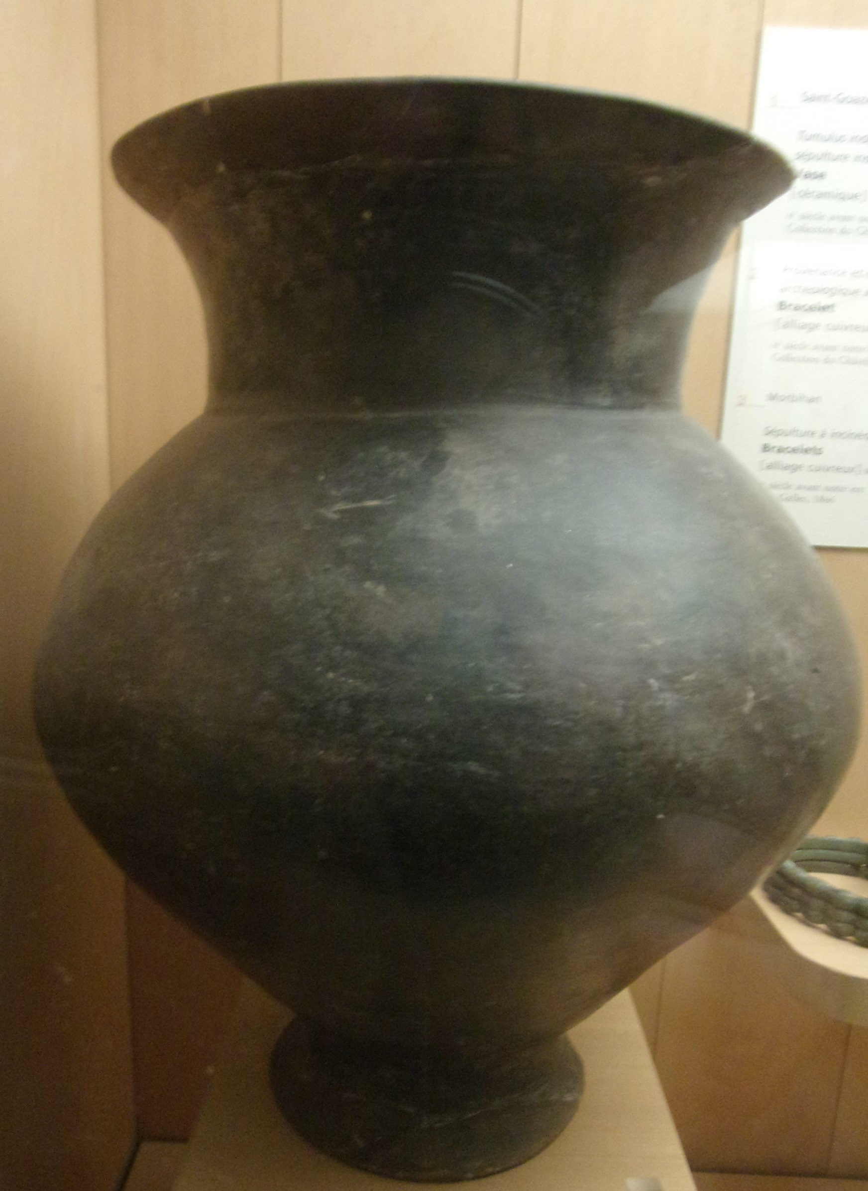 Vase en céramique datant du sixième siècle avant notre ère provenant d'un tumulus de Saint-Goazec (collection du Chatellier, 1930), au musée de Saint-Germain-en-Laye.